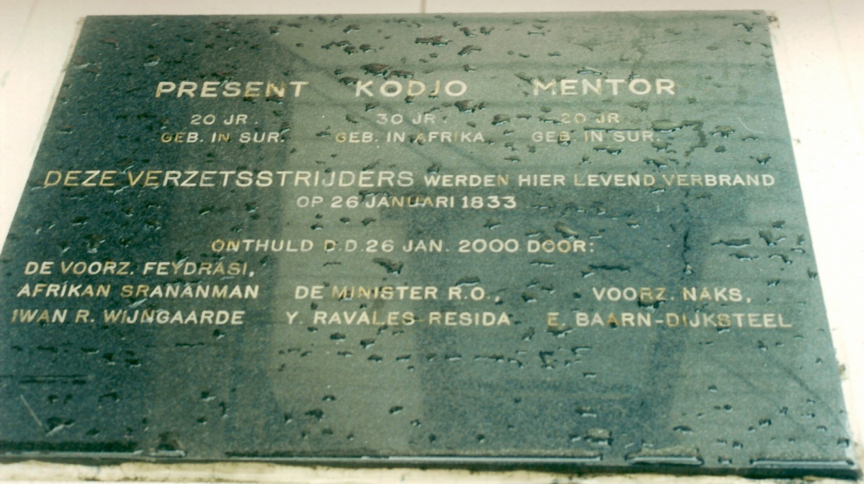 Gedenkplaat in Paramaribo voor de terechtgestelde slaven Present, Kodjo en Mentor. Eigen opname. Categorie:Slavernij